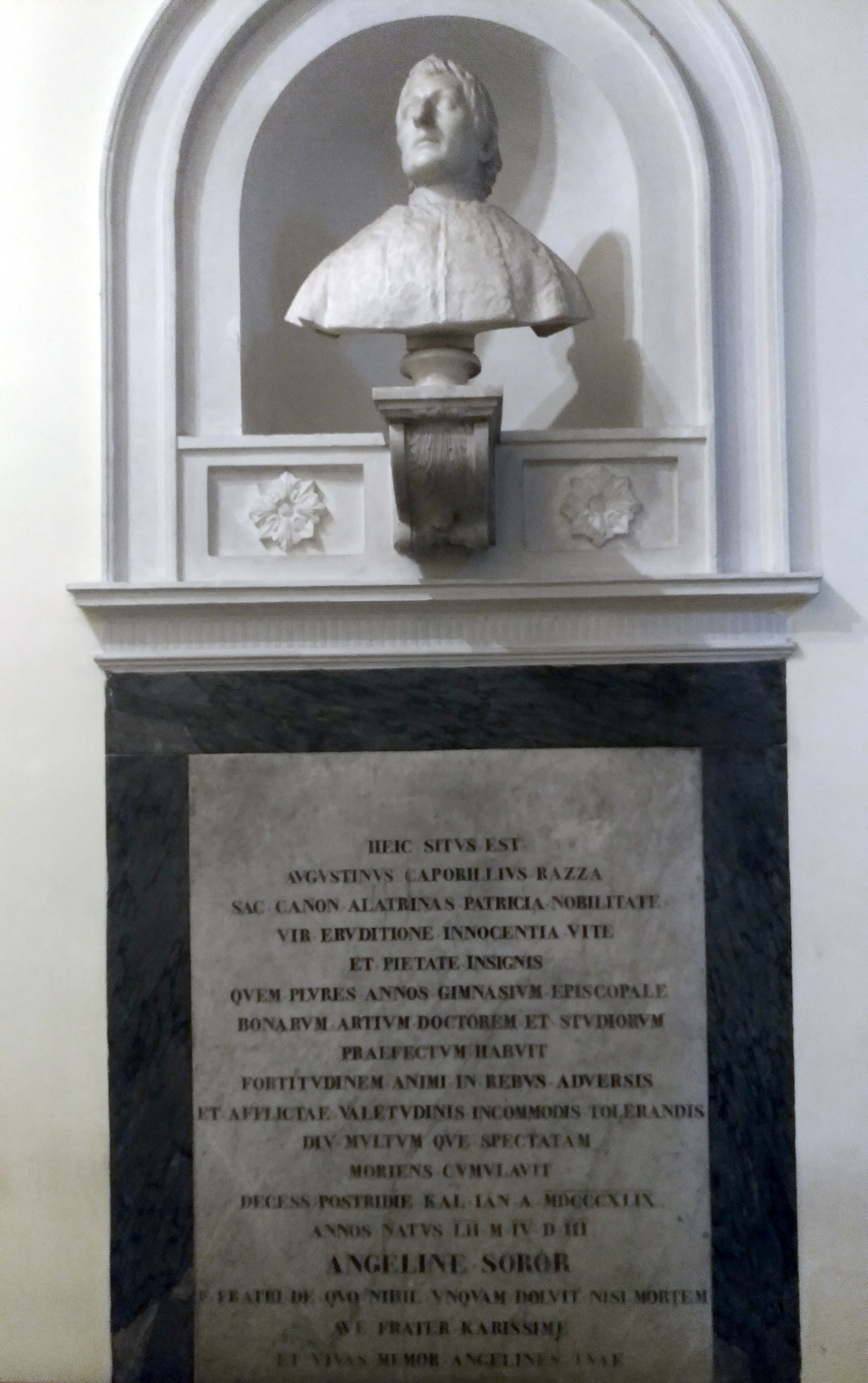 Tomba del poeta Agostino Caporilli Razza nel Duomo di Alatri